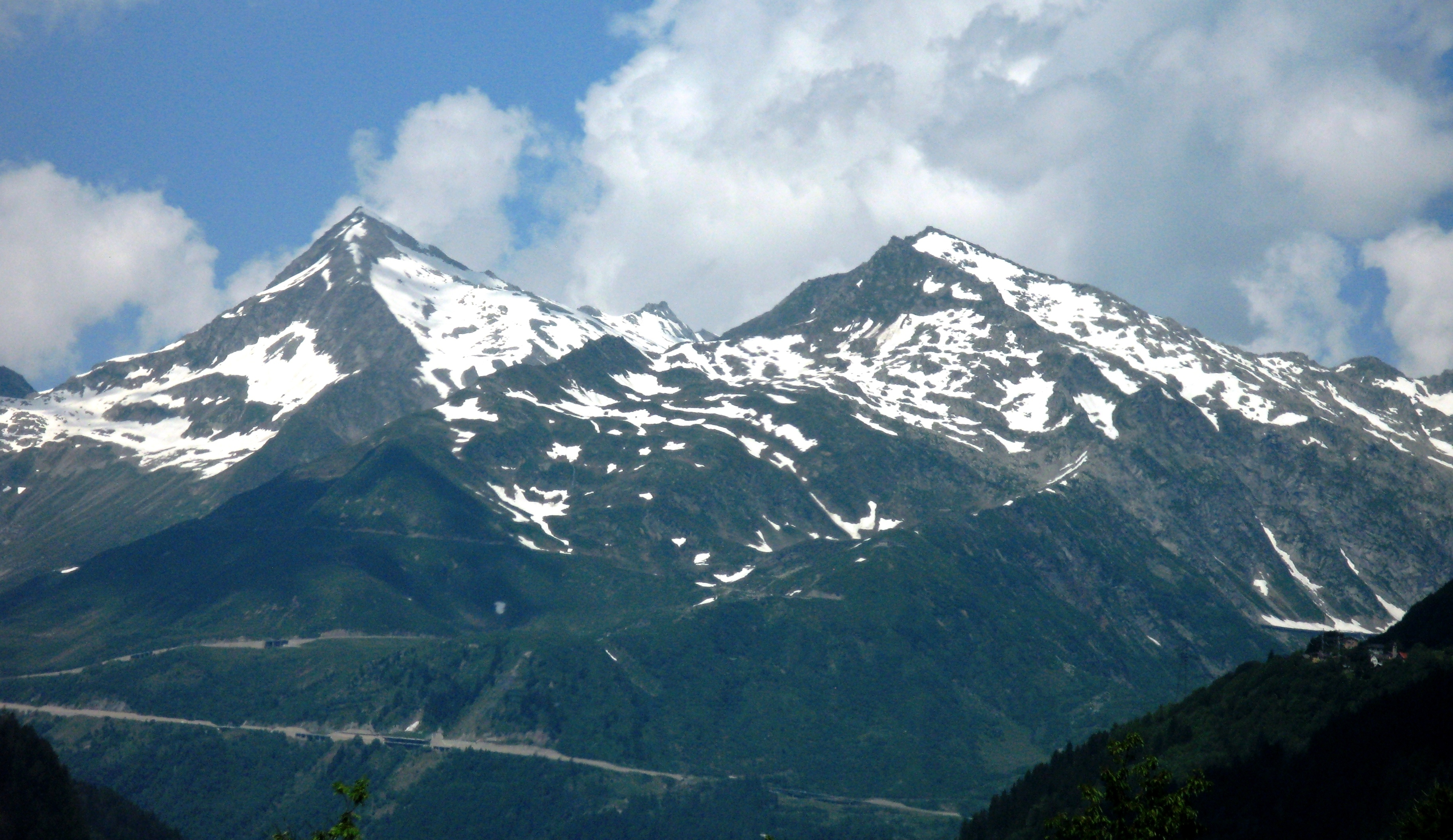 De Gotthardtmassiv mat der Passstrooss vu Süde gesinn.